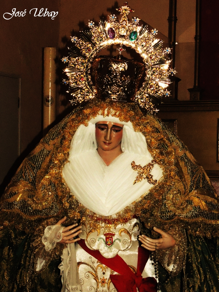 María Santísima de la Esperanza de Vegueta. (1892) Obra del escultor Arsenio de las Casas Martín. Parroquia de Santo Domingo de Guzmán - Las Palmas de Gran Canaria.